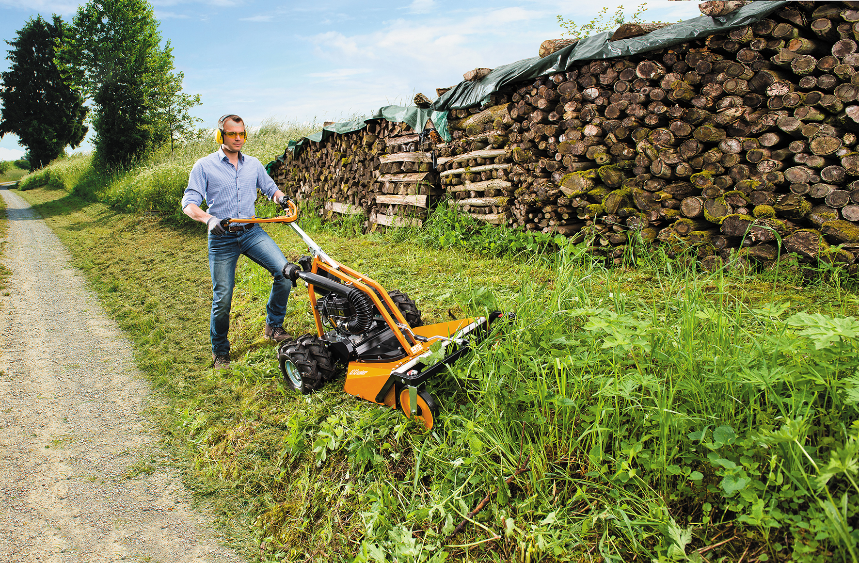 Mit einem Hochgrasmäher wie dem AS 63 lässt sich hohes Gras, Unkraut und Gestrüpp in einem Schritt mähen und mulchen. Tags: Hochgrasmäher, Allmäher, Mulchen und Mähen, Sichelmäher